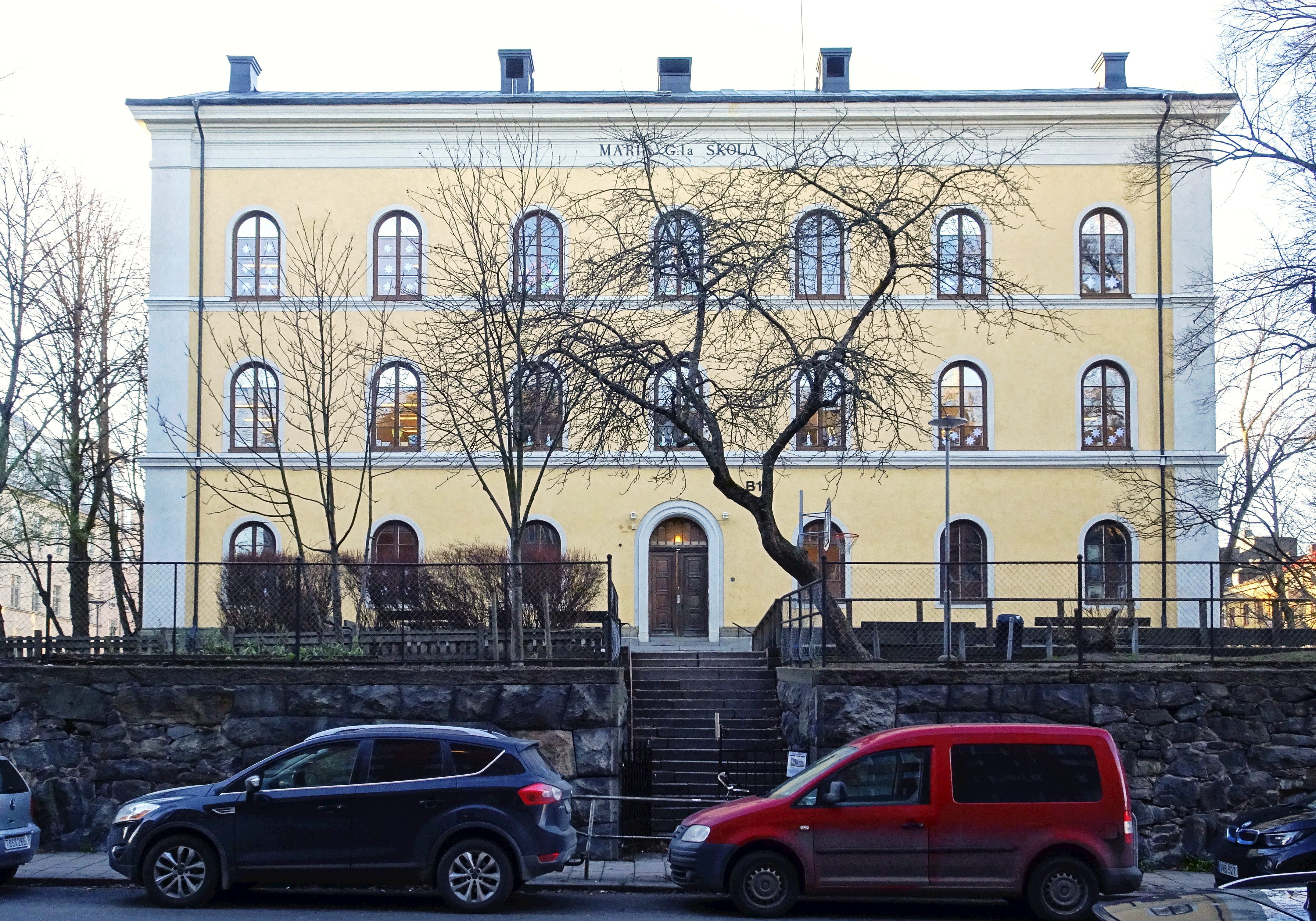 Maria Gamla Skola, den äldre delen från 1864, arkitekt Johan Fredrik Åbom